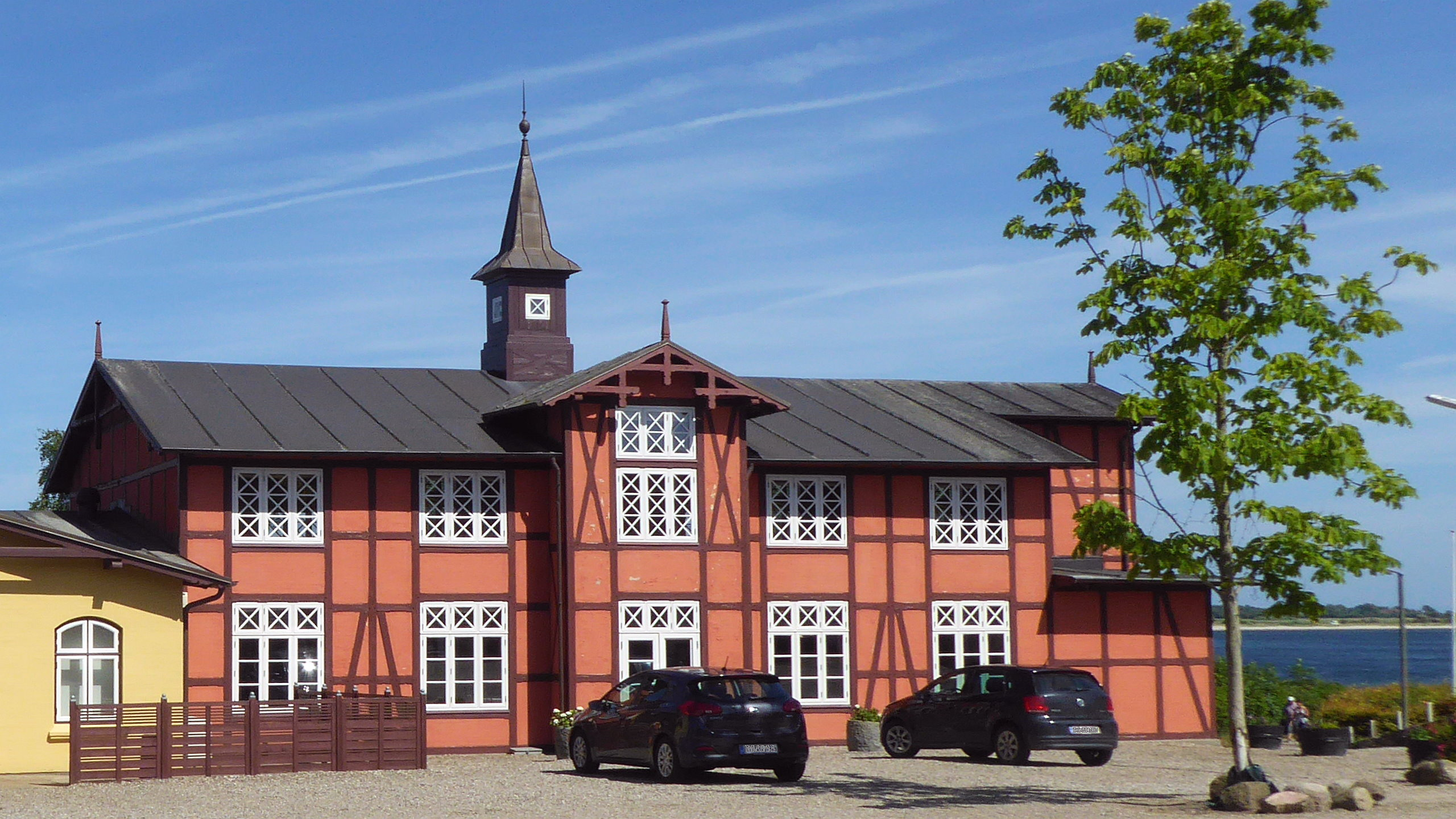 Terracottafarbenes Gebäude am Ved Færgegården in Årøsund - Region Sønderjylland, Syddanmark Jütland Dänemark Foto Wolfgang Pehlemann P1210712.jpg